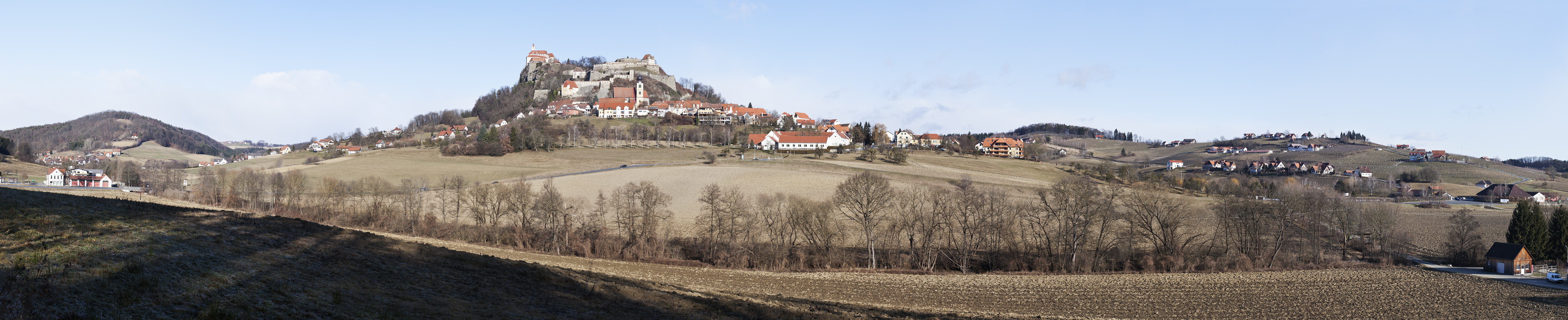 Der Ort Riegersburg von Süden